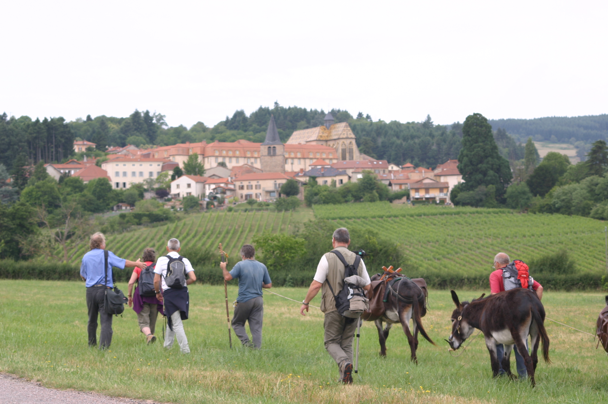 Ambierle